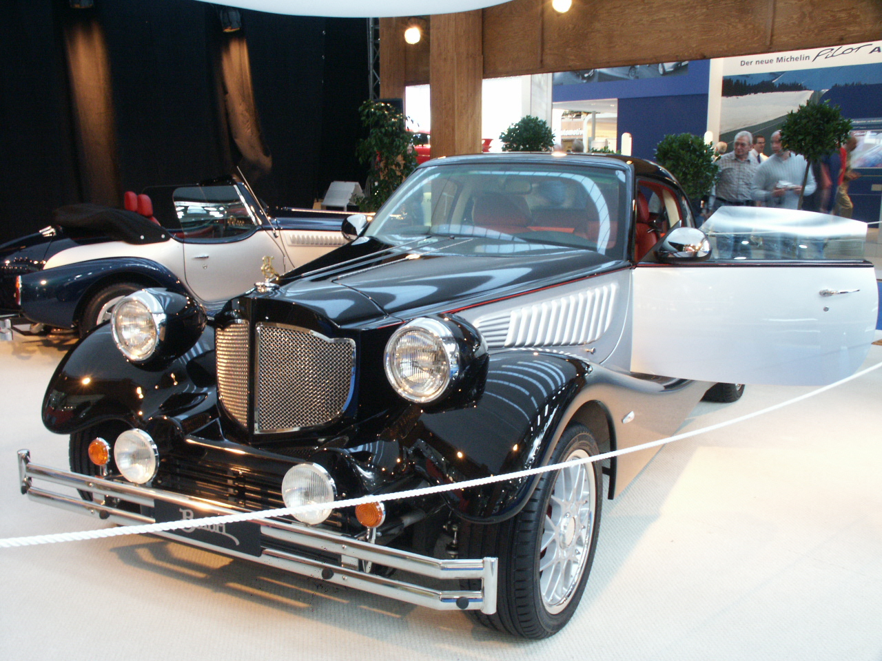 Bufori Mark III